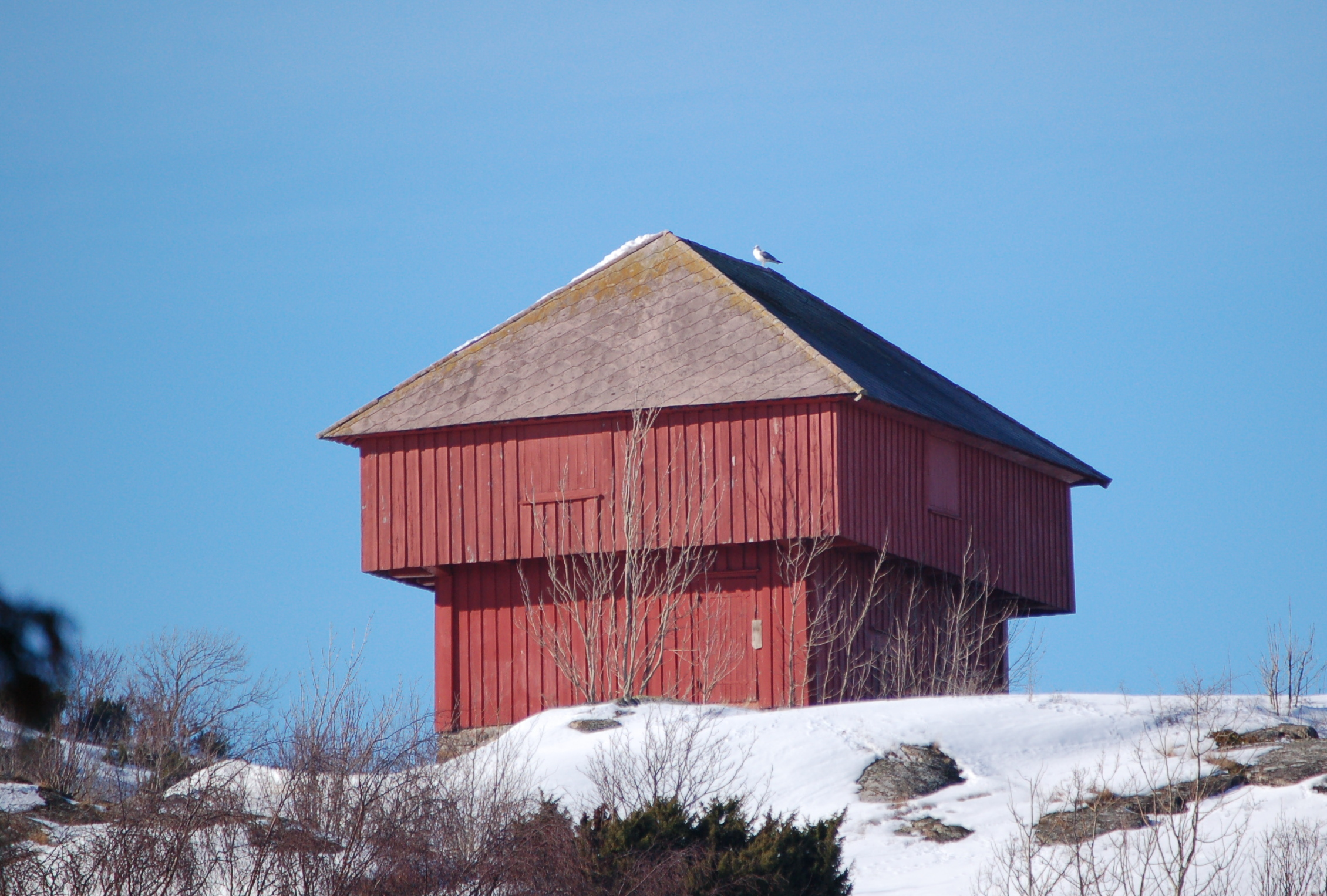 Blokkhus i Stavern